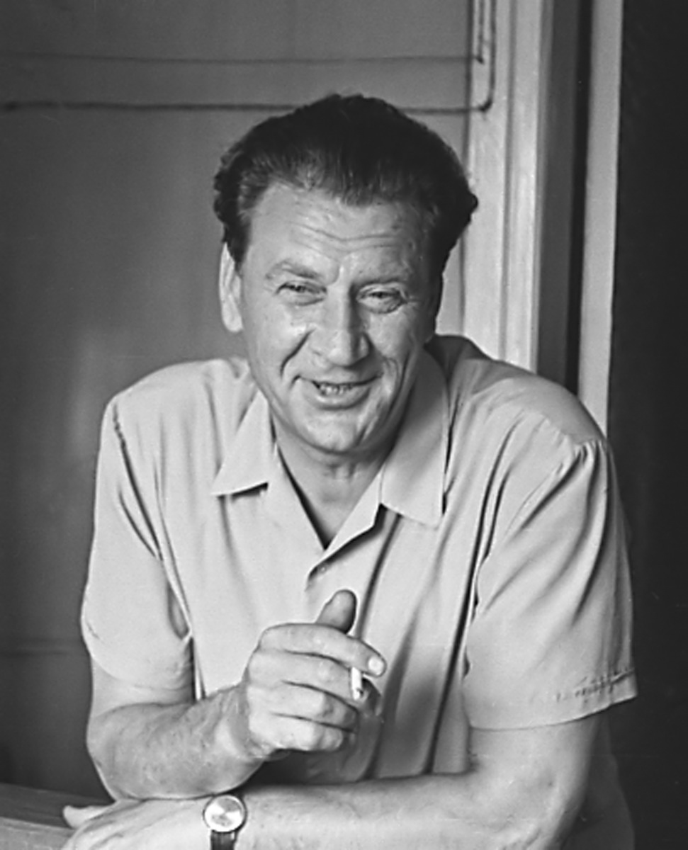 Кравцов,Тарас Тергеевич известный украинский композитор, музыковед, педагог